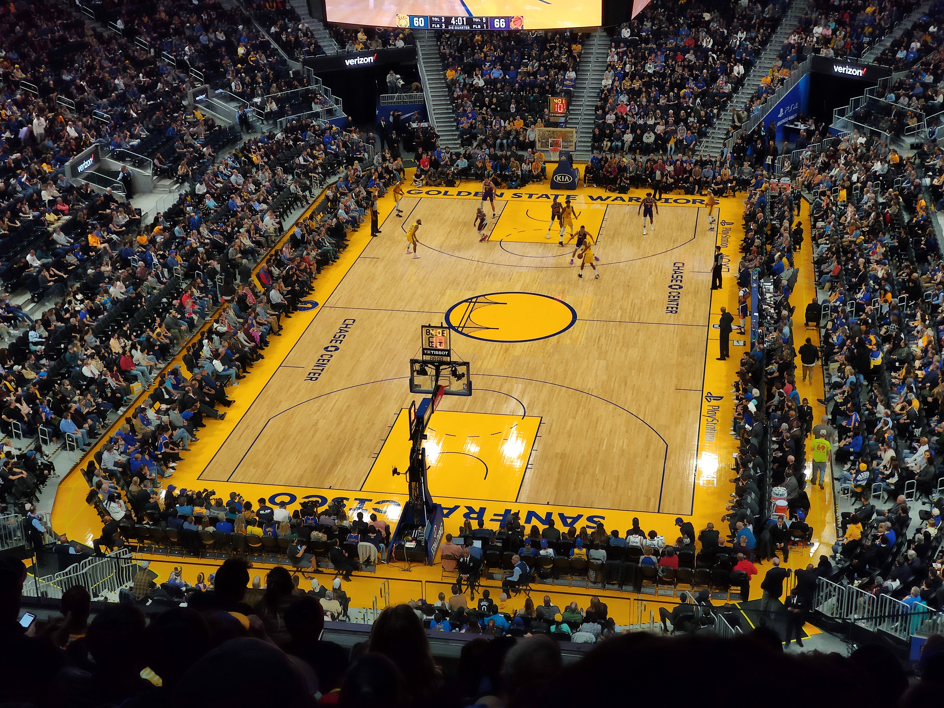 Chase Center de San Francisco (California, EE.UU.).